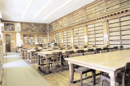 La bibliothèque universitaire de médecine à Montpellier (Hérault). Image personnelle